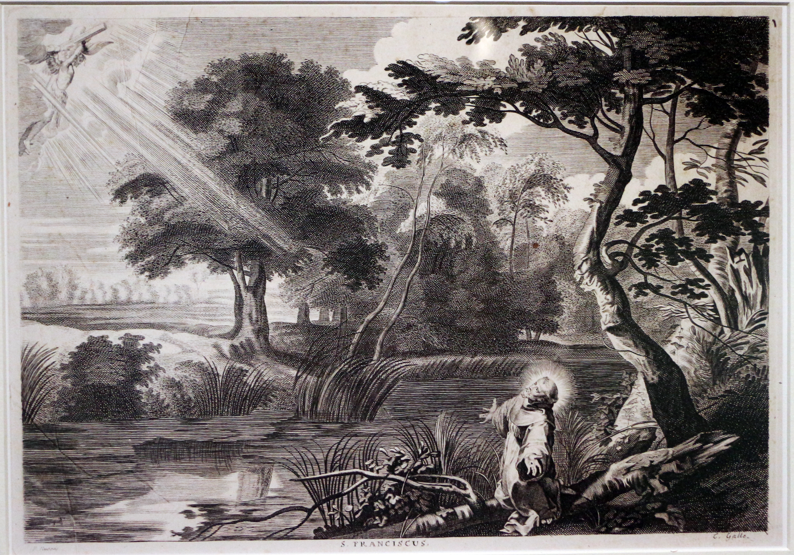 Cornelis galle da rubens, francesco riceve le stigmate in un paesaggio olandese, 1650-1700 ca. (roma, museo francescano).JPG